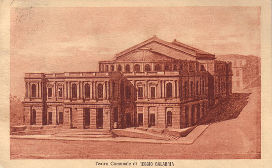 Postcard of the Teatro Comunale di Reggio Calabria, Ed. Luigi Coppola, Reggio Calabria; sent to Roma in 1922